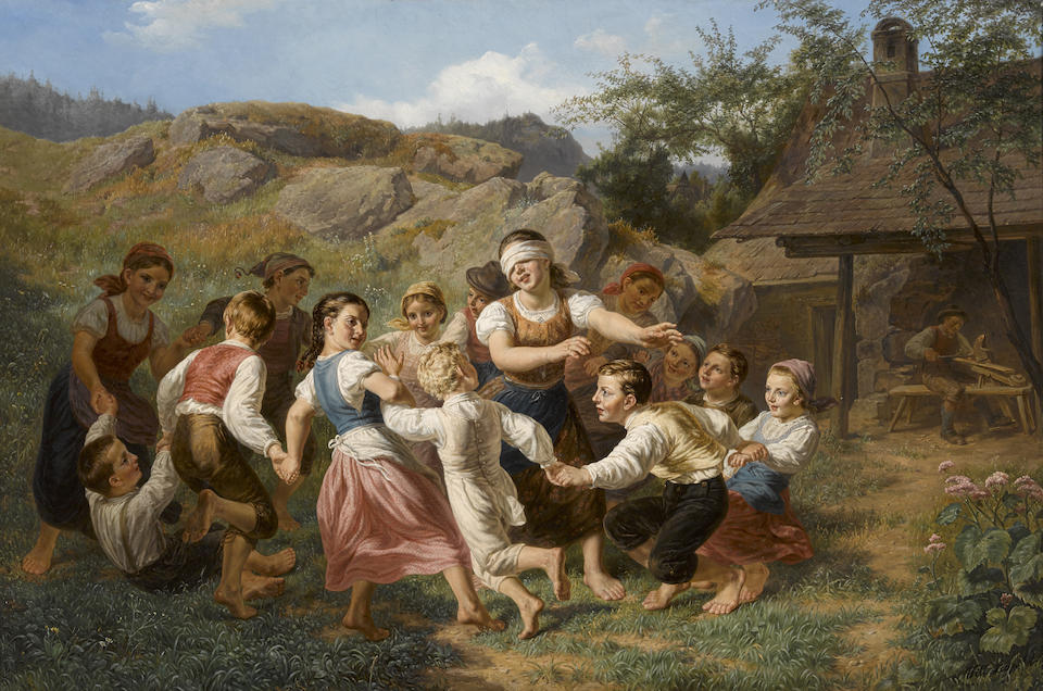 Blindekuh